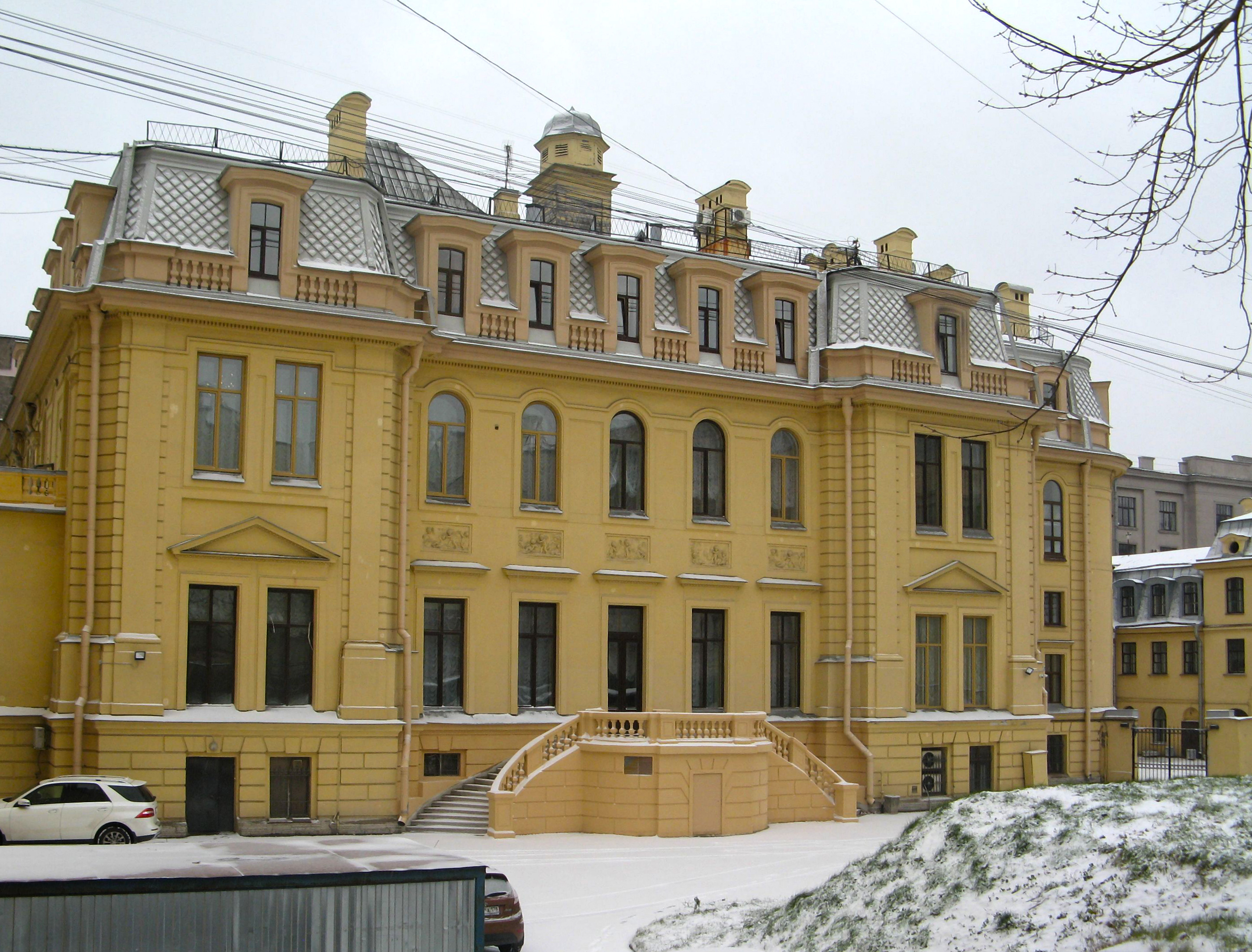 Дом К.А. Горчакова: Большая Монетная улица, 17-19 литера Б, Петроградский район, Санкт-Петербург